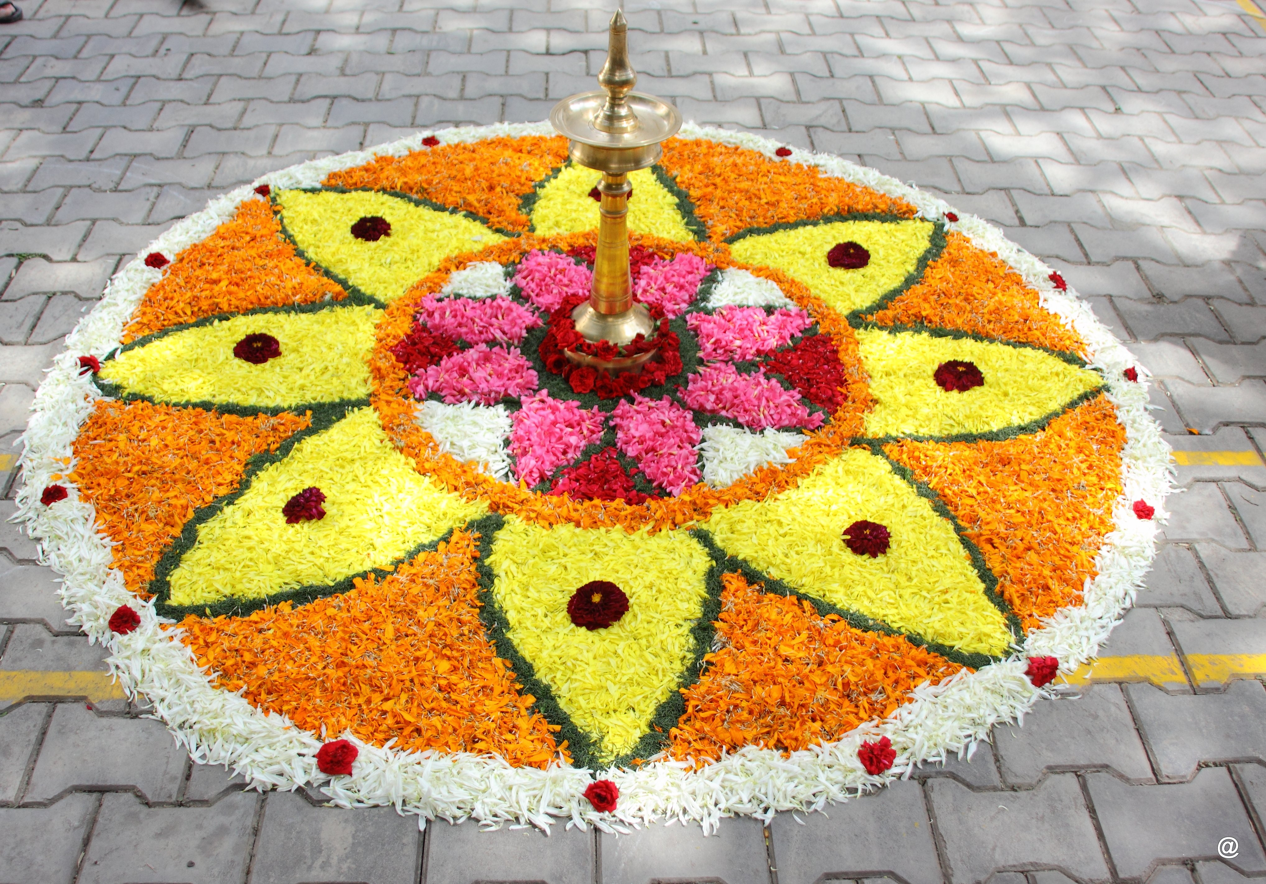 അത്തപ്പൂക്കളം ബംഗ്ലൂരിലെ ഒരു ആഘോഷത്തില്‍ നിന്ന്.